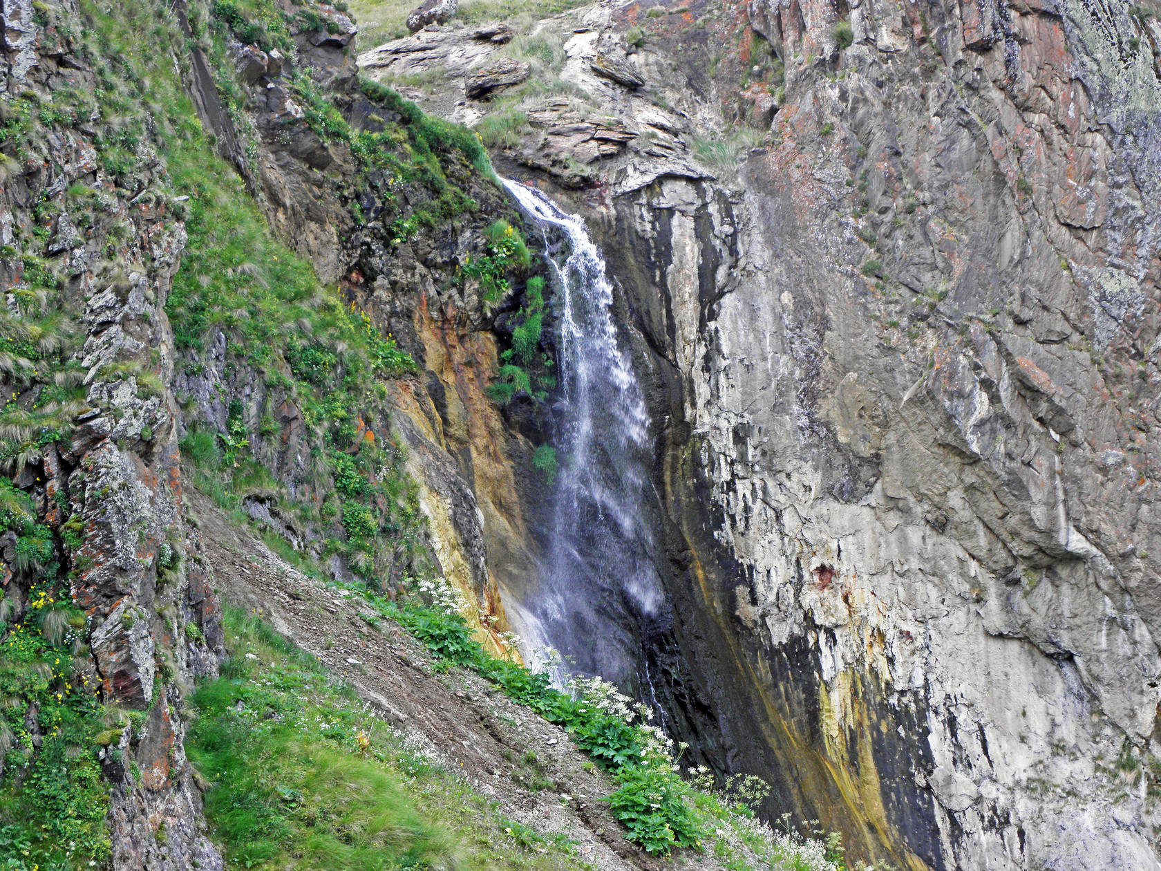 фото